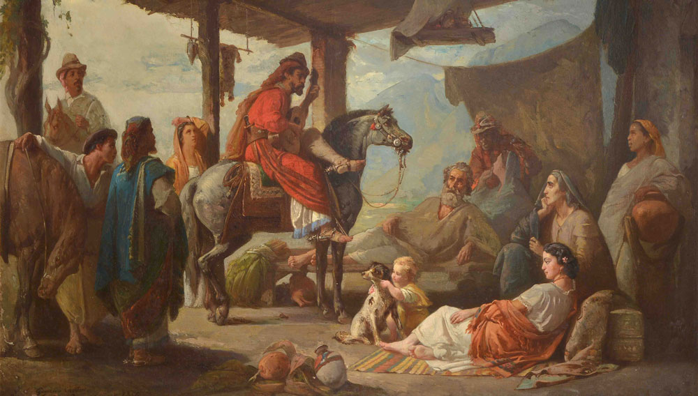 Le gaucho cantor, barde de la république argentine. Es una obra de gran interés: la escena transcurre en San Juan, con el fondo de paisaje de la cordillera. Entre las doce figuras se destaca el gaucho que toca la guitarra montado en su caballo, mientras que un grupo de mujeres, ancianos y niños se encuentra echado sobre alfombras dispuestas bajo el alero del rancho al que ingresa el cantor. 1856 León Ambroise Gauthier